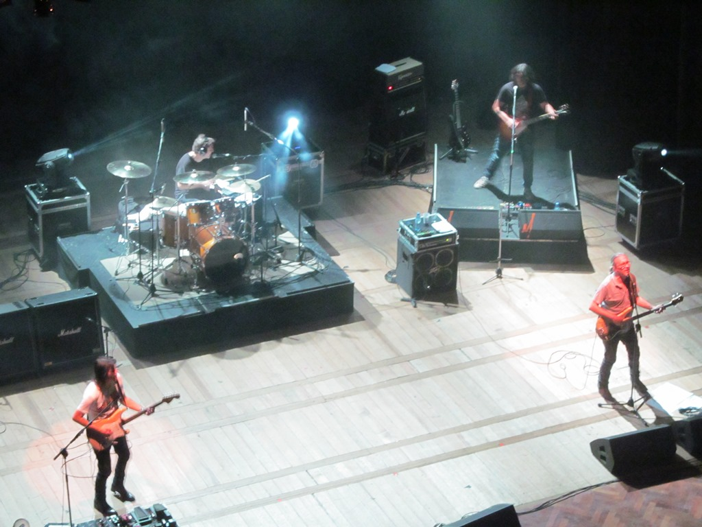 Enanitos Verdes. Recital en Rosario el 1 de diciembre de 2012. De izquierda a derecha: Felipe Staiti, Jota Morelli, Juan Pablo Staiti y Marciano Cantero